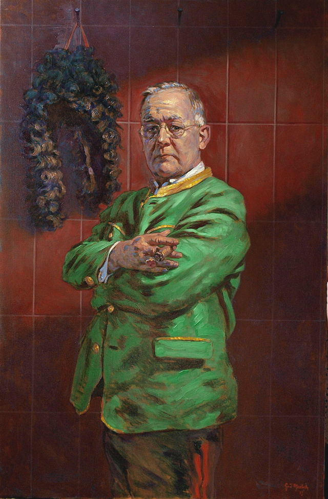 Porträt des Hans-Gerd Jauch